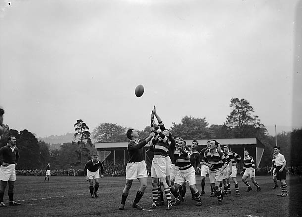 Teitl Cymraeg/Welsh title: Cyfuniad o dimau Trecelyn a Phontypool yn erbyn y Springboks Ffotograffydd/Photographer: Geoff Charles (1909-2002) Dyddiad/Date: 26/10/1951 Cyfrwng/Medium: Negydd ffilm / Film negative Cyfeiriad/Reference: (gch02285) Rhif cofnod / Record no.: 3368287 Rhagor o wybodaeth am gasgliad Geoff Charles yn Llyfrgell Genedlaethol Cymru More information about the Geoff Charles Collection at the National Library of Wales Mae ffotograffau Geoff Charles hefyd yn rhan o Broject Europeana Libraries Geoff Charles' photographs also form part of the Europeana Libraries Project